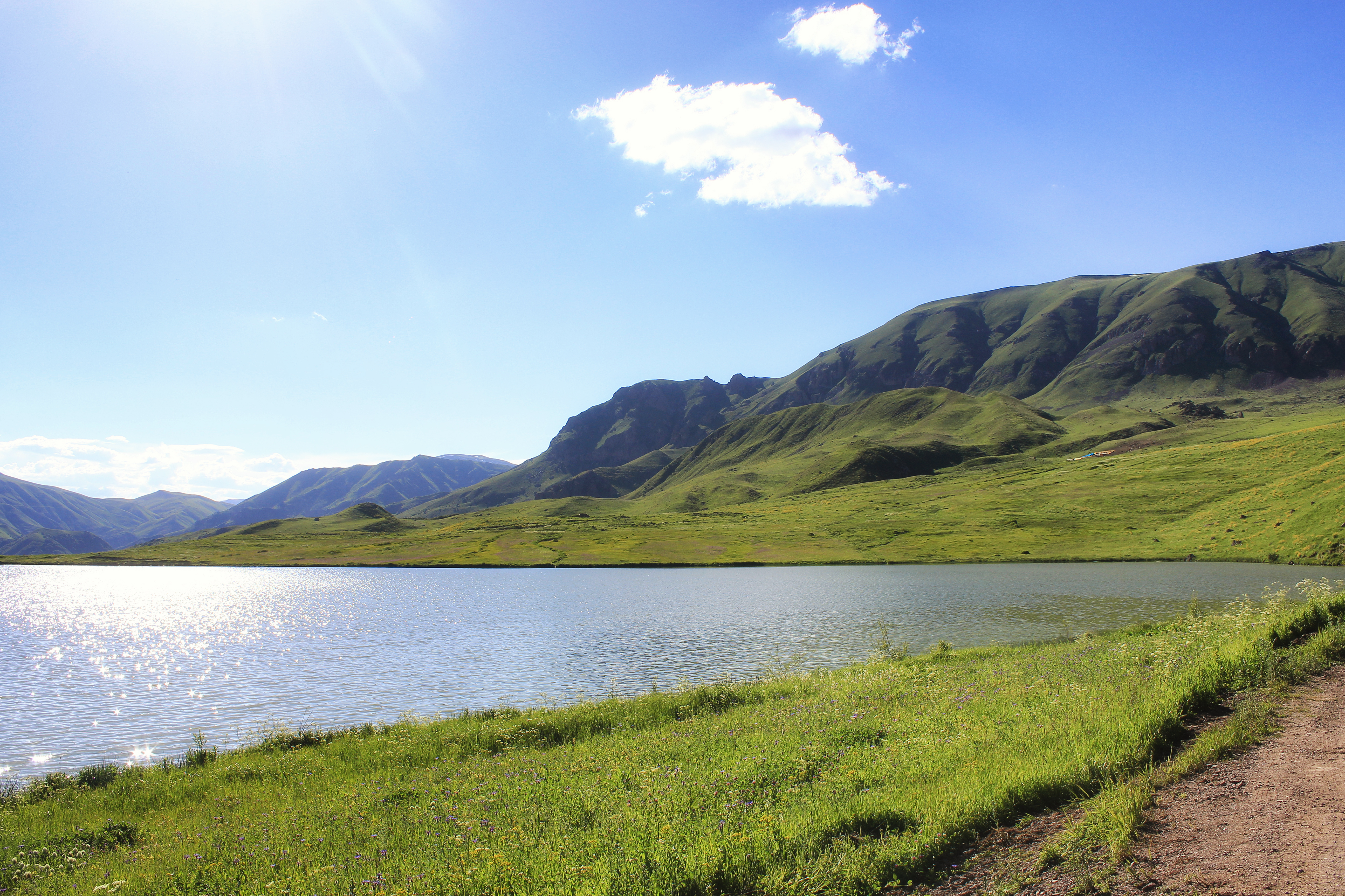 Batabat gölü